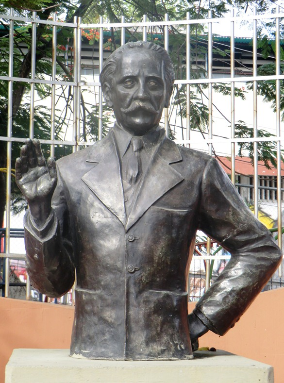 Estatua del músico Vicente Emilio Sojo. Se encuentra en Guatire, Venezuela, su ciudad natal.